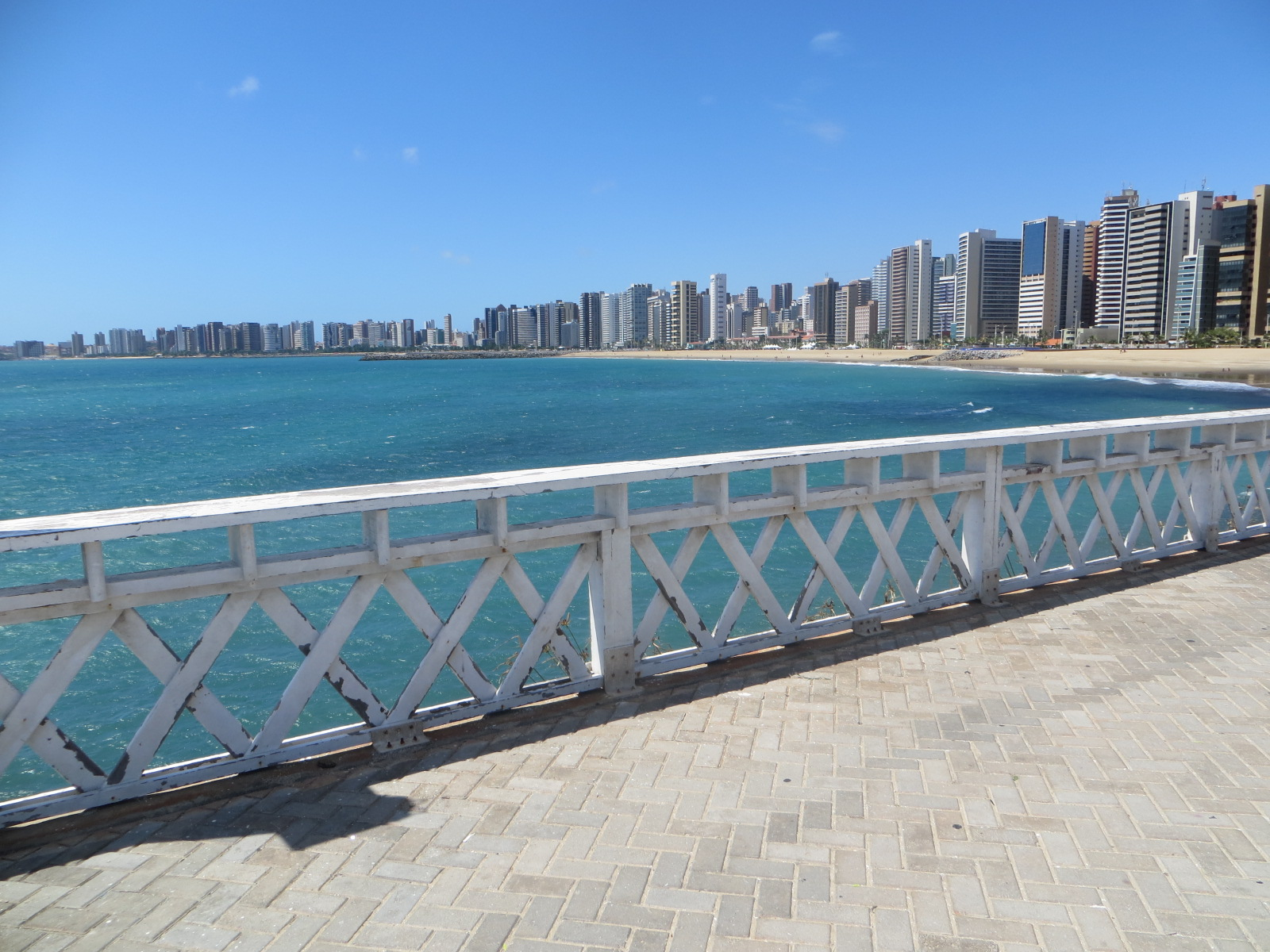 Fortaleza, Brazil - Brasil, Ceará